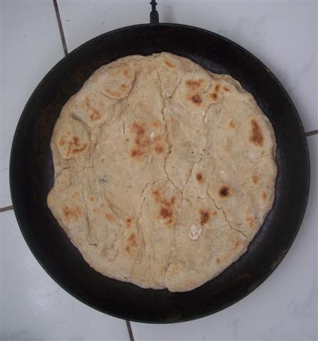 Kendim cektim, telifini kamu mali olarak tayin ediyorum.